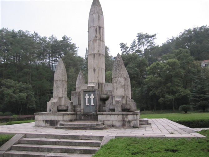 忠烈祠纪念塔